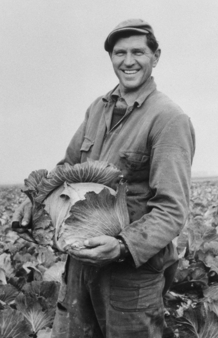 Jan Langedijk.